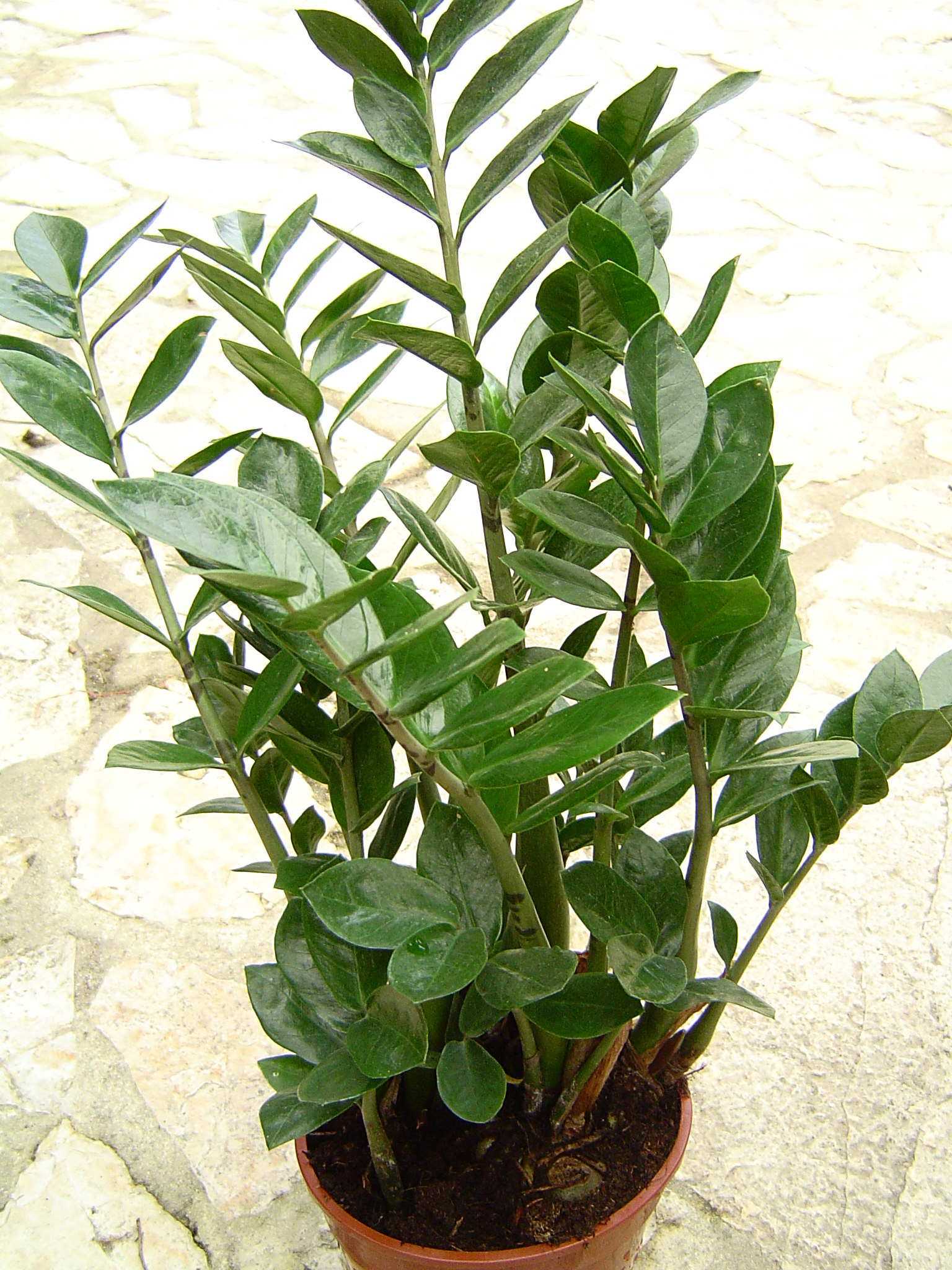 Photo d'un Zamioculcas zamiifolia cultivé. Famille des Araceae